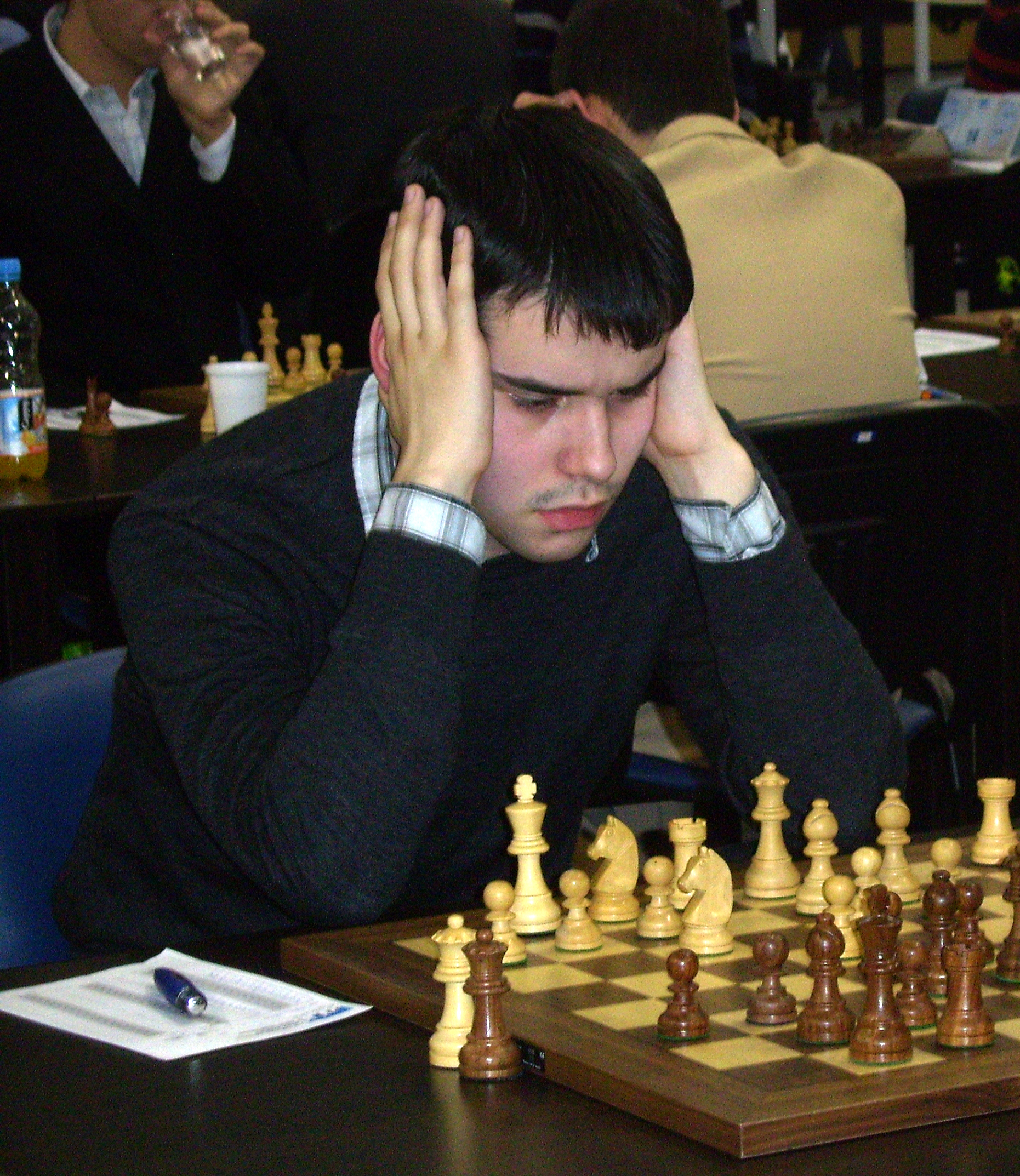 Mladi ruski velemajstor Ian Nepomniači (Nepomniachtchi) na 11. Europskom pojedinačnom prvenstvu u šahu za muškarce i žene 2010. g. u Rijeci